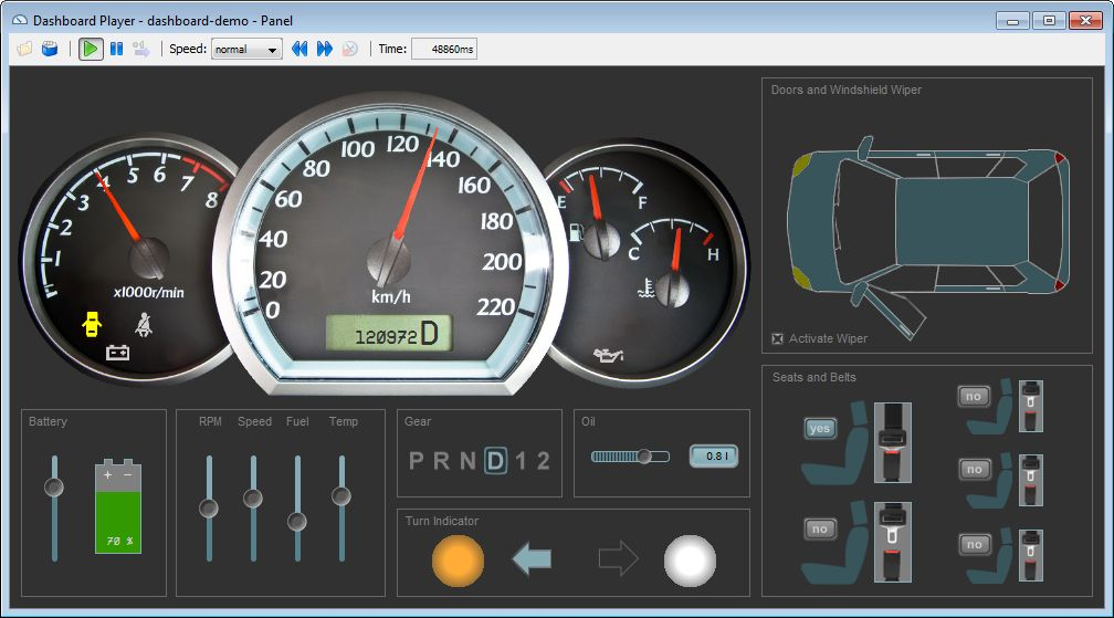 Mit dem TPT Dashboard könenn eigene Oberflächen für den interaktiven Test erstellt werden